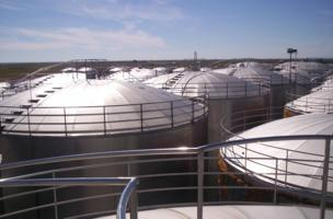 Foto realizada desde lo alto de uno de los depósitos de Bodegas Cristo de la Vega